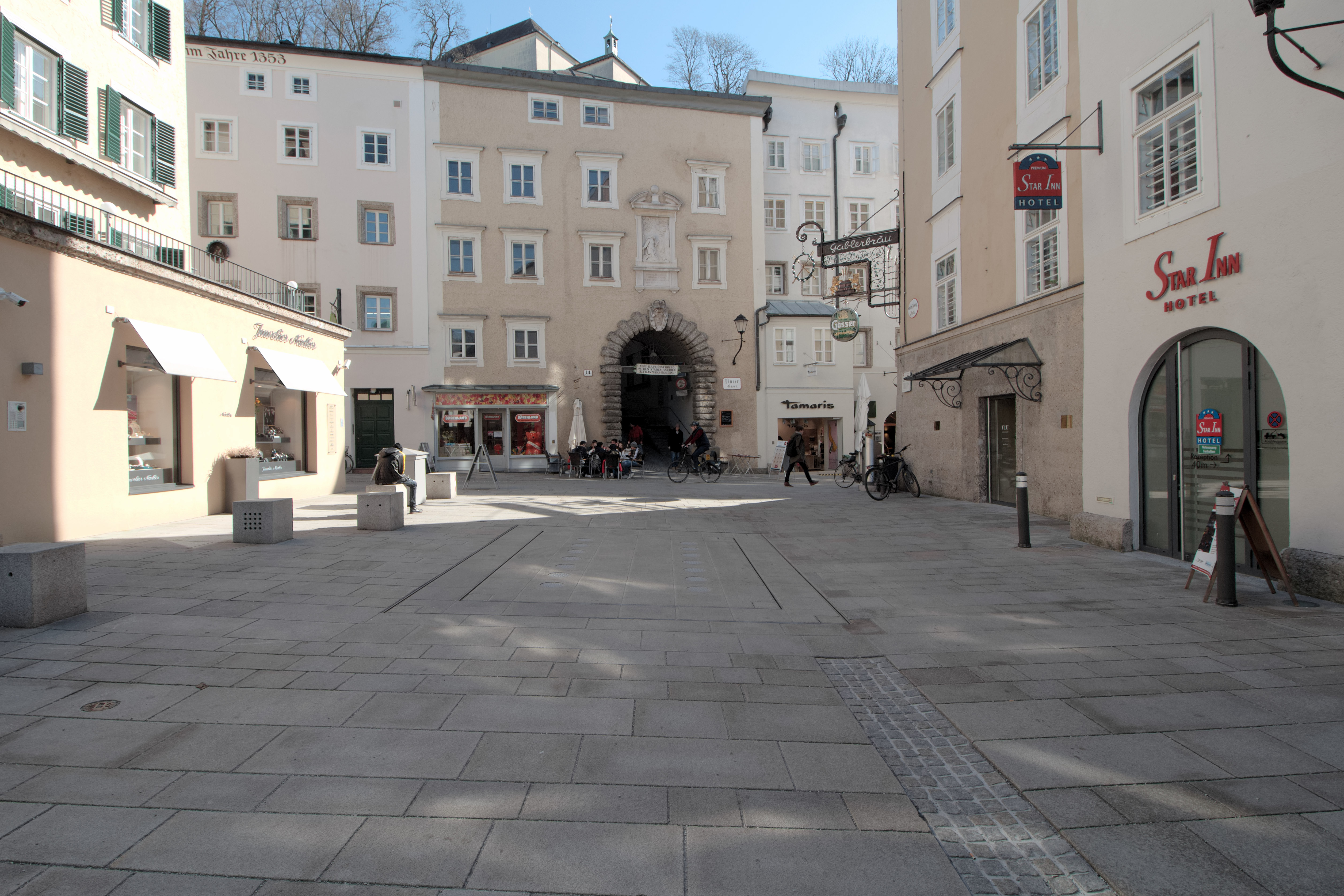 Salzburg, rechte Altstadt: Stefan-Zweig-Platz - Ansicht Richtung Linzergasse; im Hintergrund Haus Linzer Gasse 14 mit der Franziskuspforte auf den Kapuzinerberg, Beginn des Stefan-Zweig-Wegs.